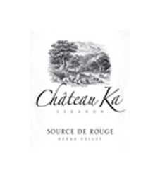 Etiquette de Bouteille du vin Château Ka